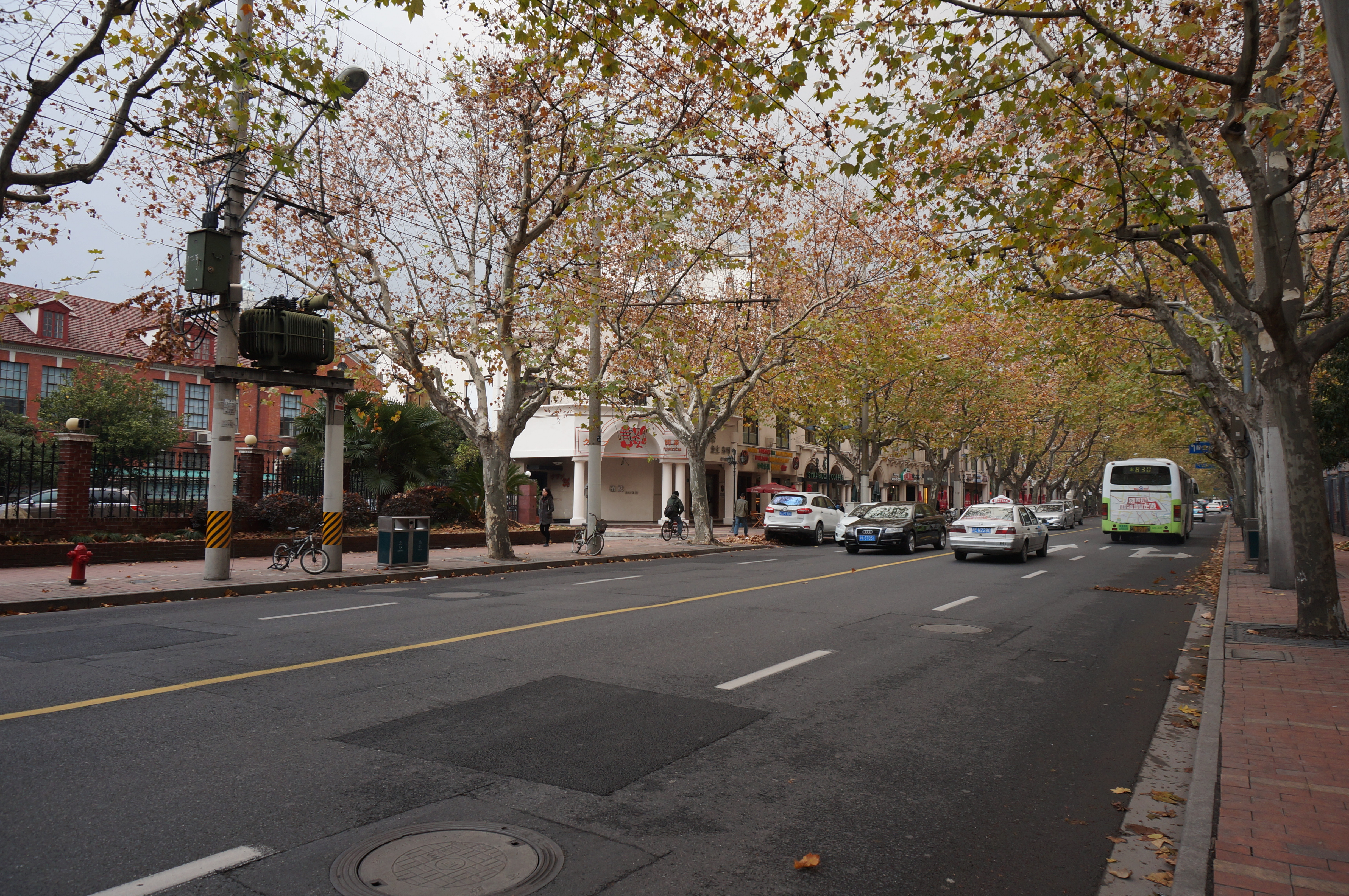 衡山路街景